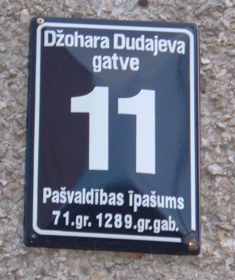 Табличка с надписью "улица Джохара Дудаева" в Риге